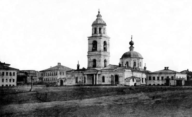 Самара. Хлебная площадь. Казанский собор ("Старый собор")